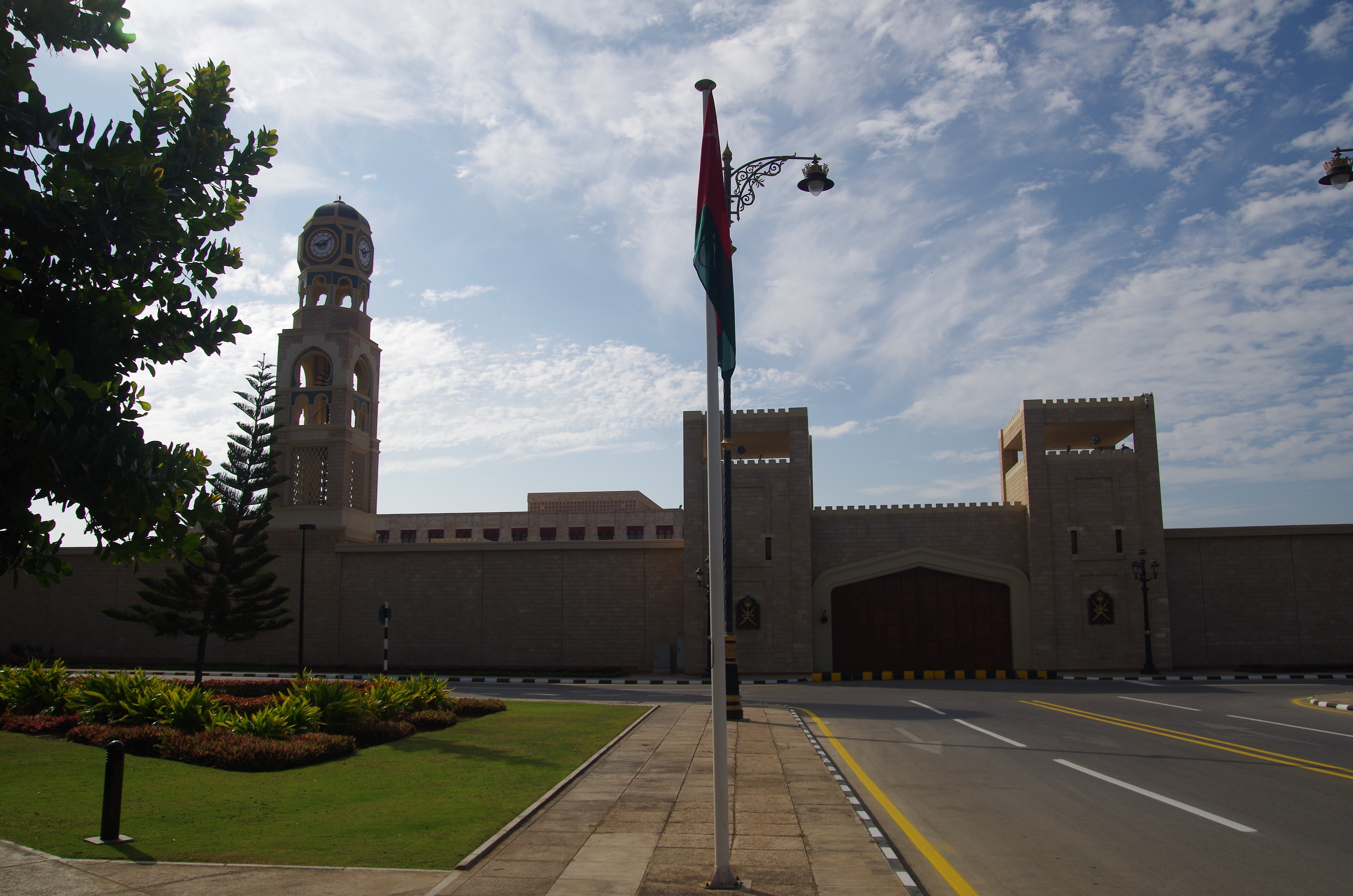 Sultanspalast Salalah Außenansicht